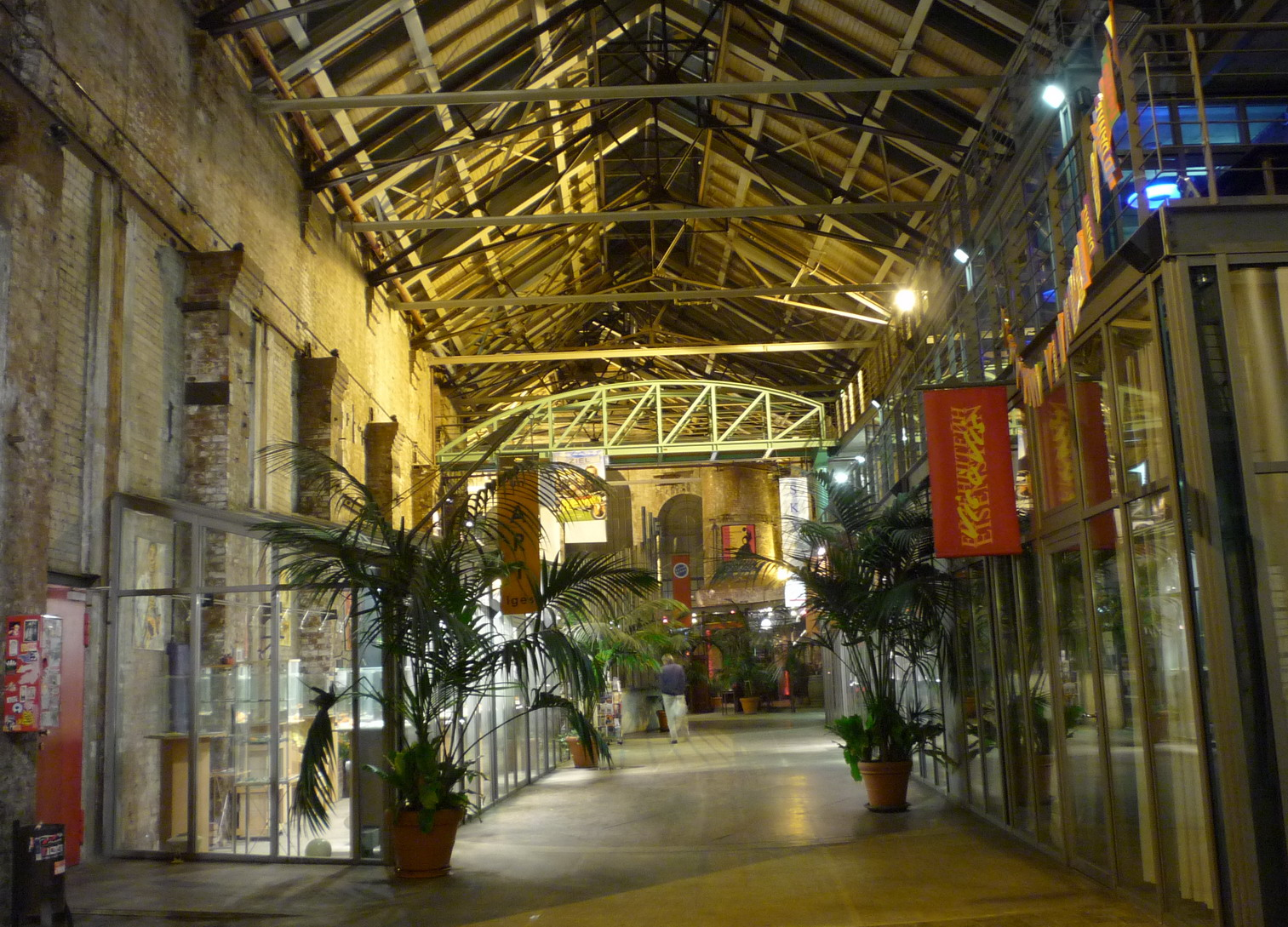 Hamburg Ottensen Zeise Hallen - ehemalige Schiffschraubenfabrik